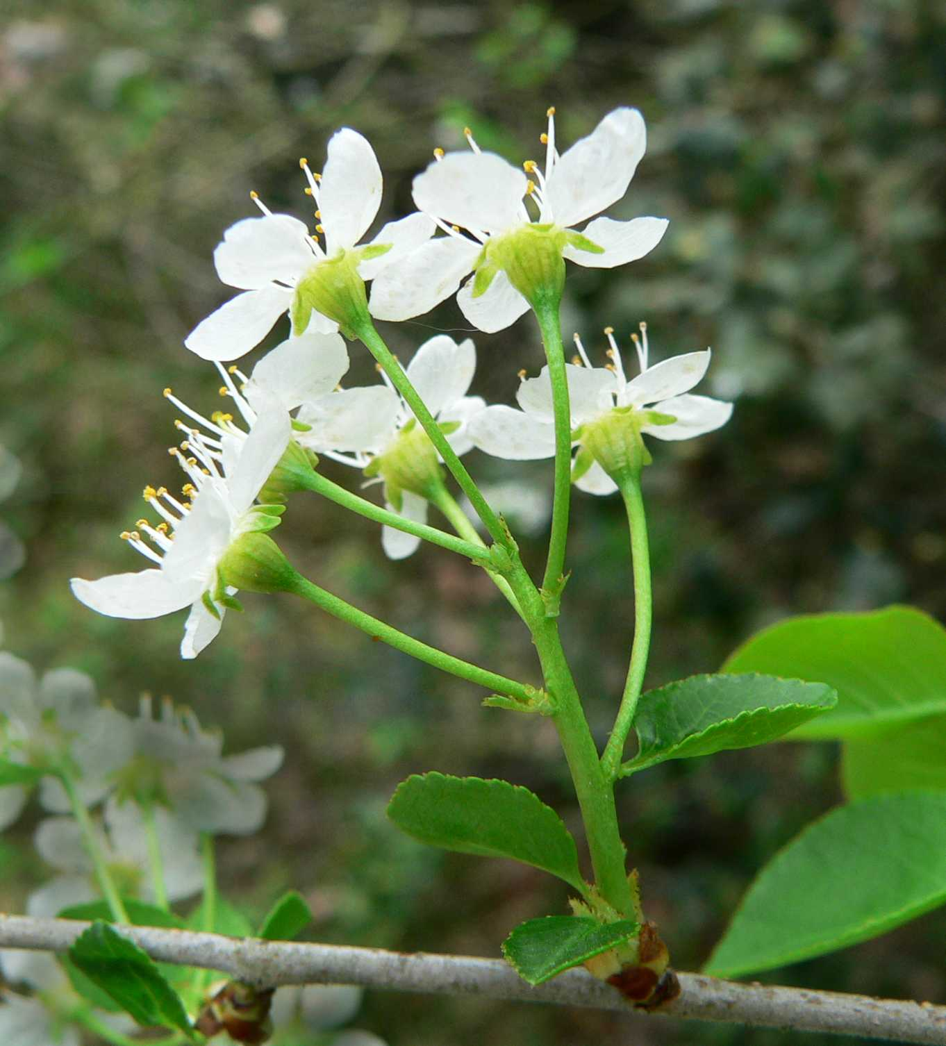 Prunus mahaleb, inflorescence dressée, Saint Même les Carrières (Charente)